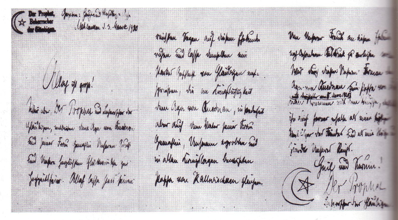 Scherzhafter Ferman (Erlaß) des "Großen Propheten" alias Arthur Daehnke